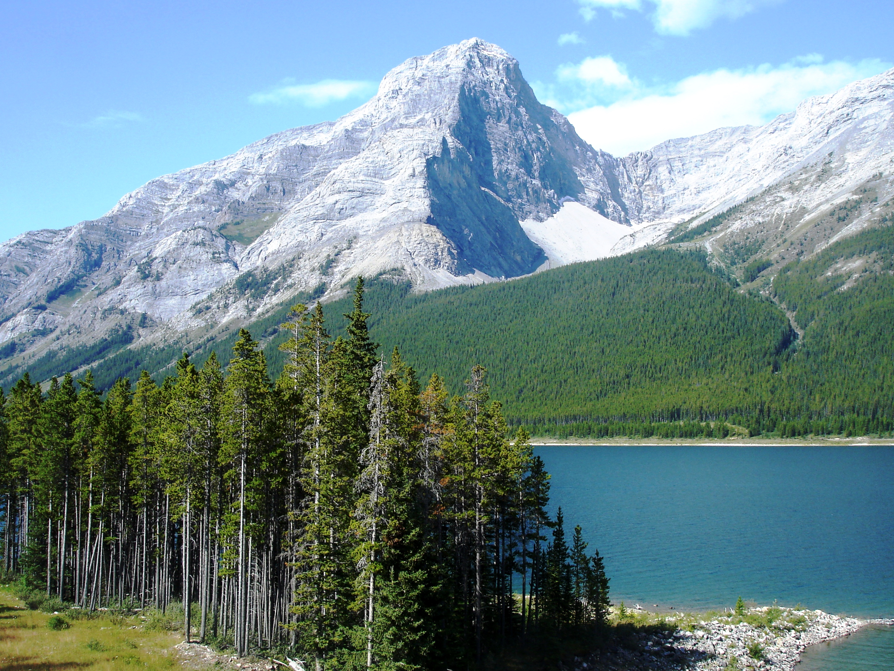 Spray Lakes